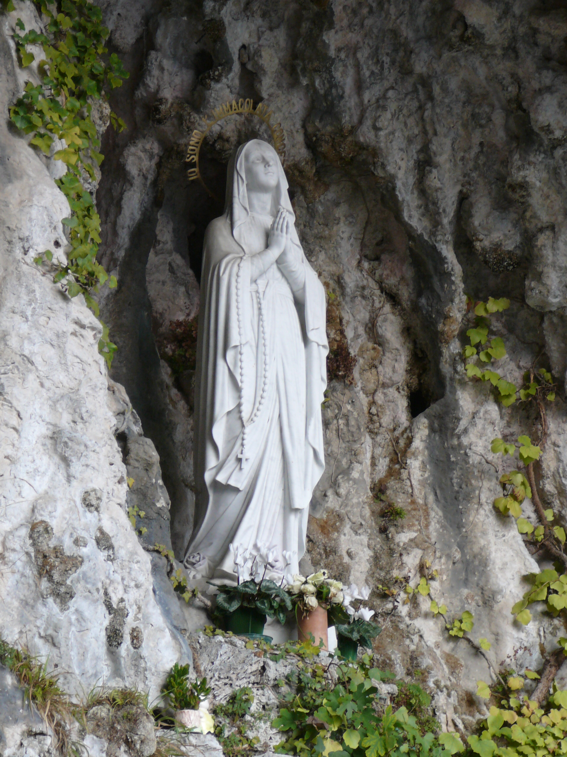 Grotta di Lourdes a Mezzocorona